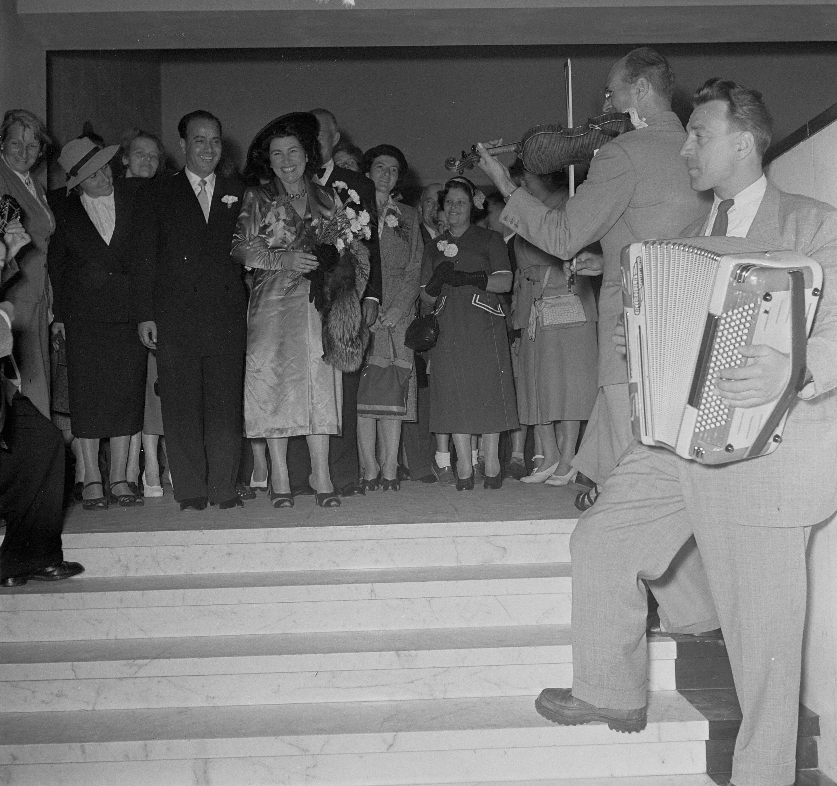 Huwelijk van Maarten Kaptein en Jetty Cantor